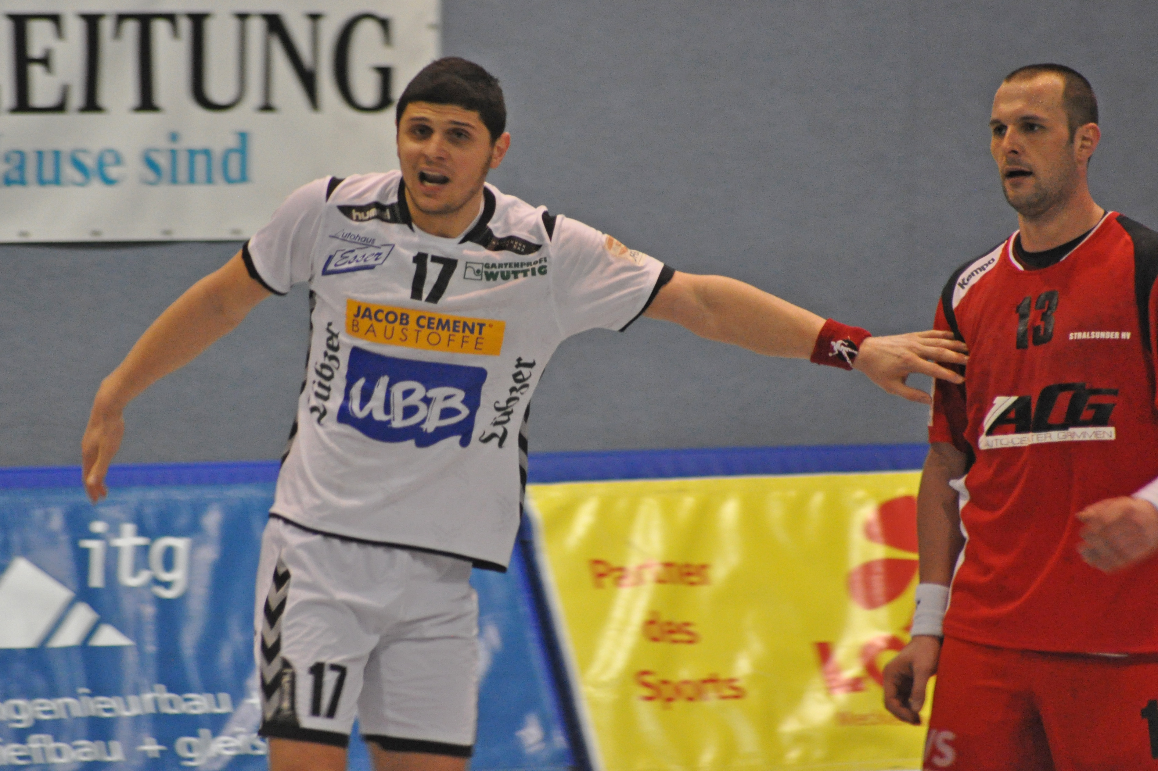 Bild aufgenommen beim Spiel in der 3. Liga (DHB) zwischen dem Stralsunder HV und dem HSV Insel Usedom am 23. März 2013 in der Stralsunder Vogelsanghalle. Das Speil endete 30:29 für den Stralsunder HV. Todor Ruskow vom HSV Insel Usedom, hier mit Markus Dau vom Stralsunder HV